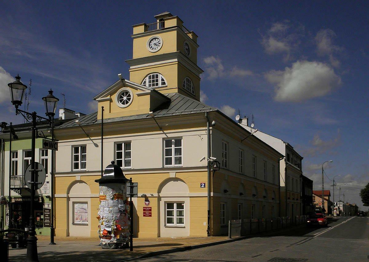 Ratusz - widok z ul.Armii Krajowej.